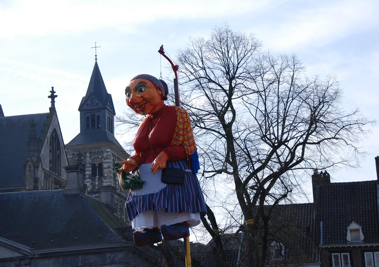 Limburgs: Mooswief, vastelaovessymbool in Mestreech